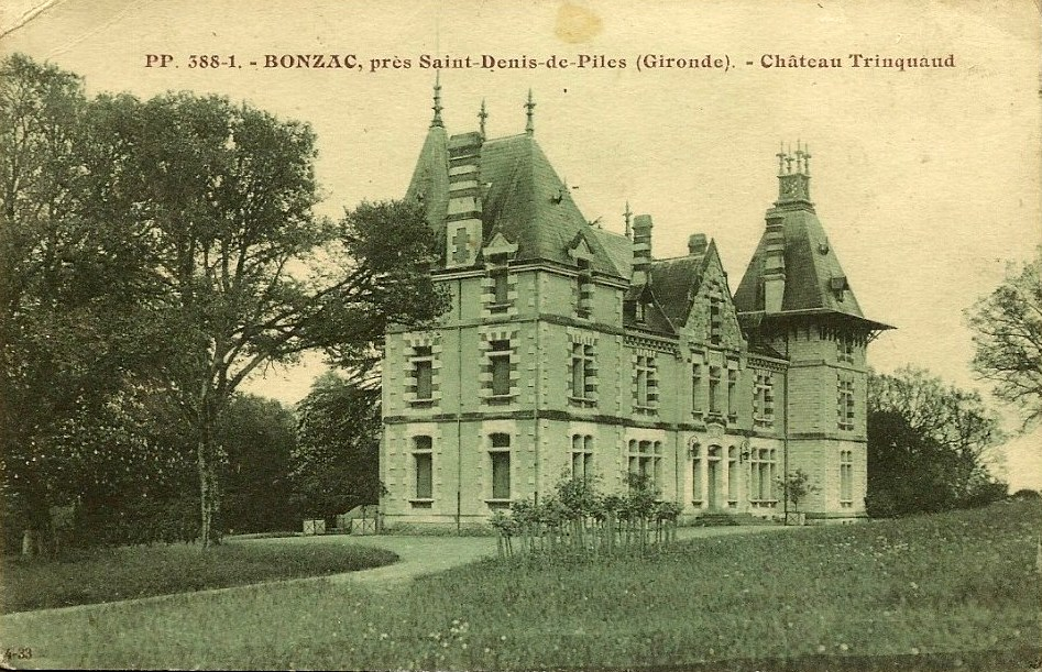 Bonzac on post-cards